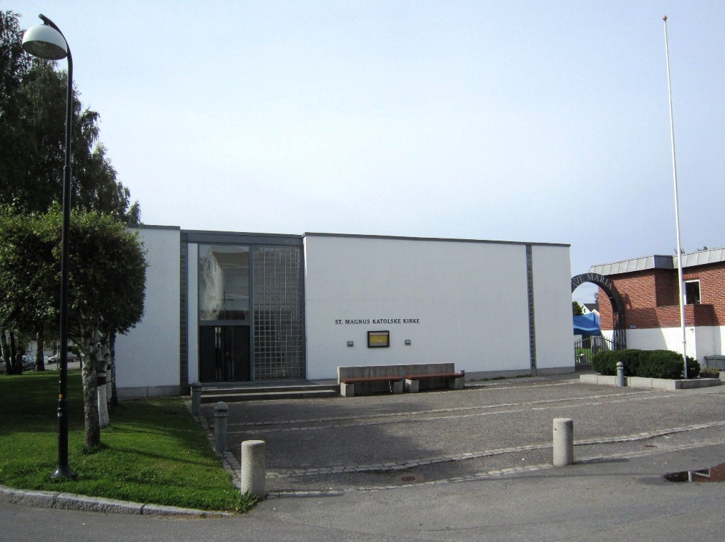 St. Magnus katolske kirke, Lillestrøm